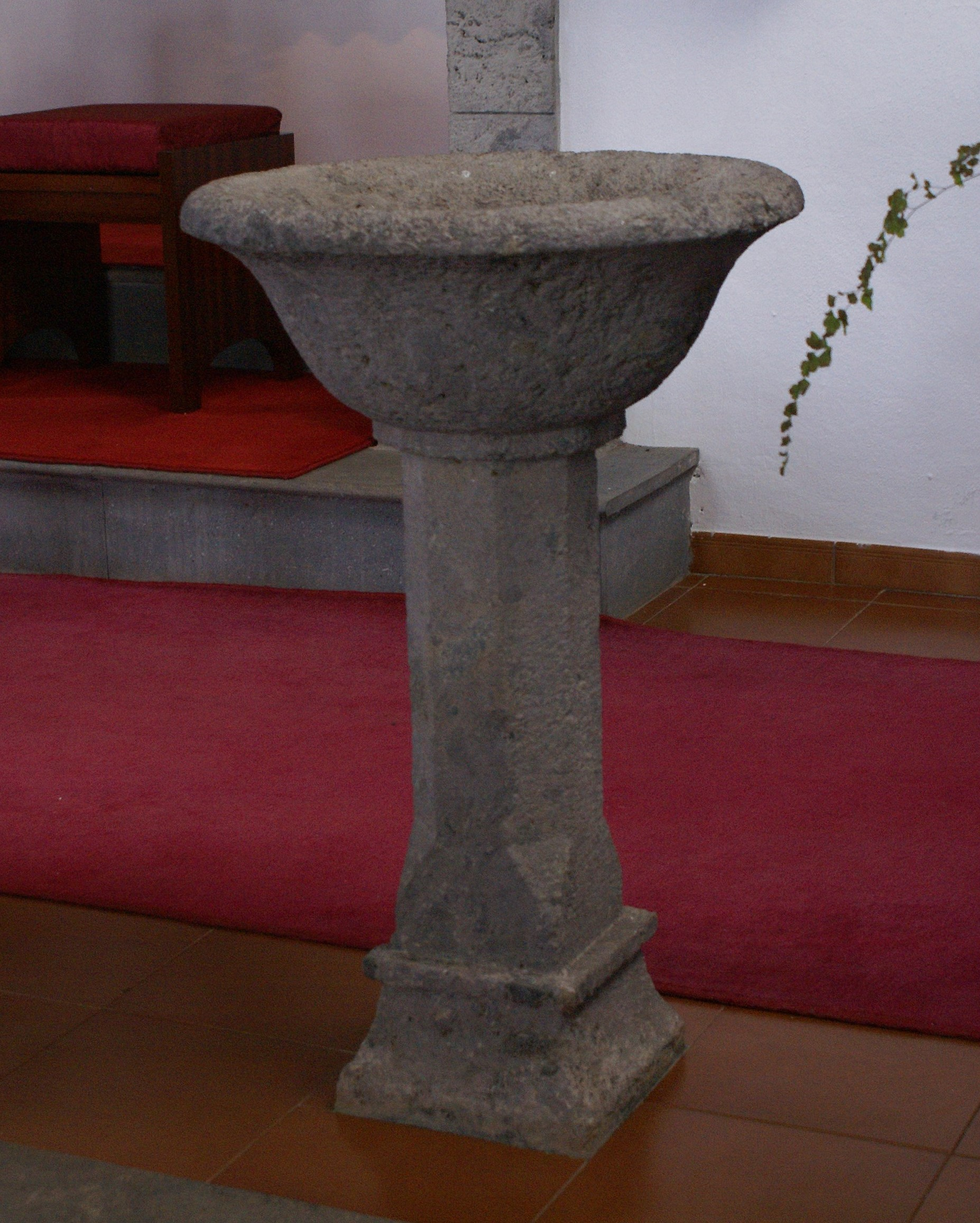 Anterior pia batismal da igreja de São Tomé. Editada de